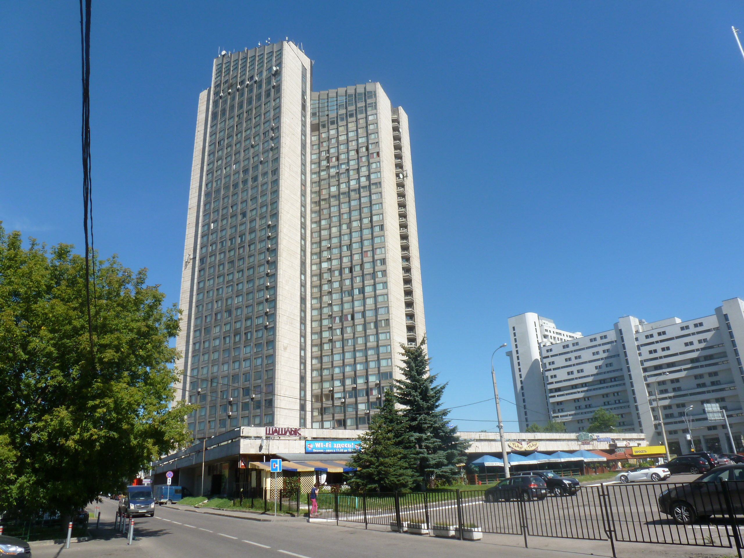 Centra domo de turistoj (hotelo) cxe Lenin-avenuo, Moskvo, Rusio